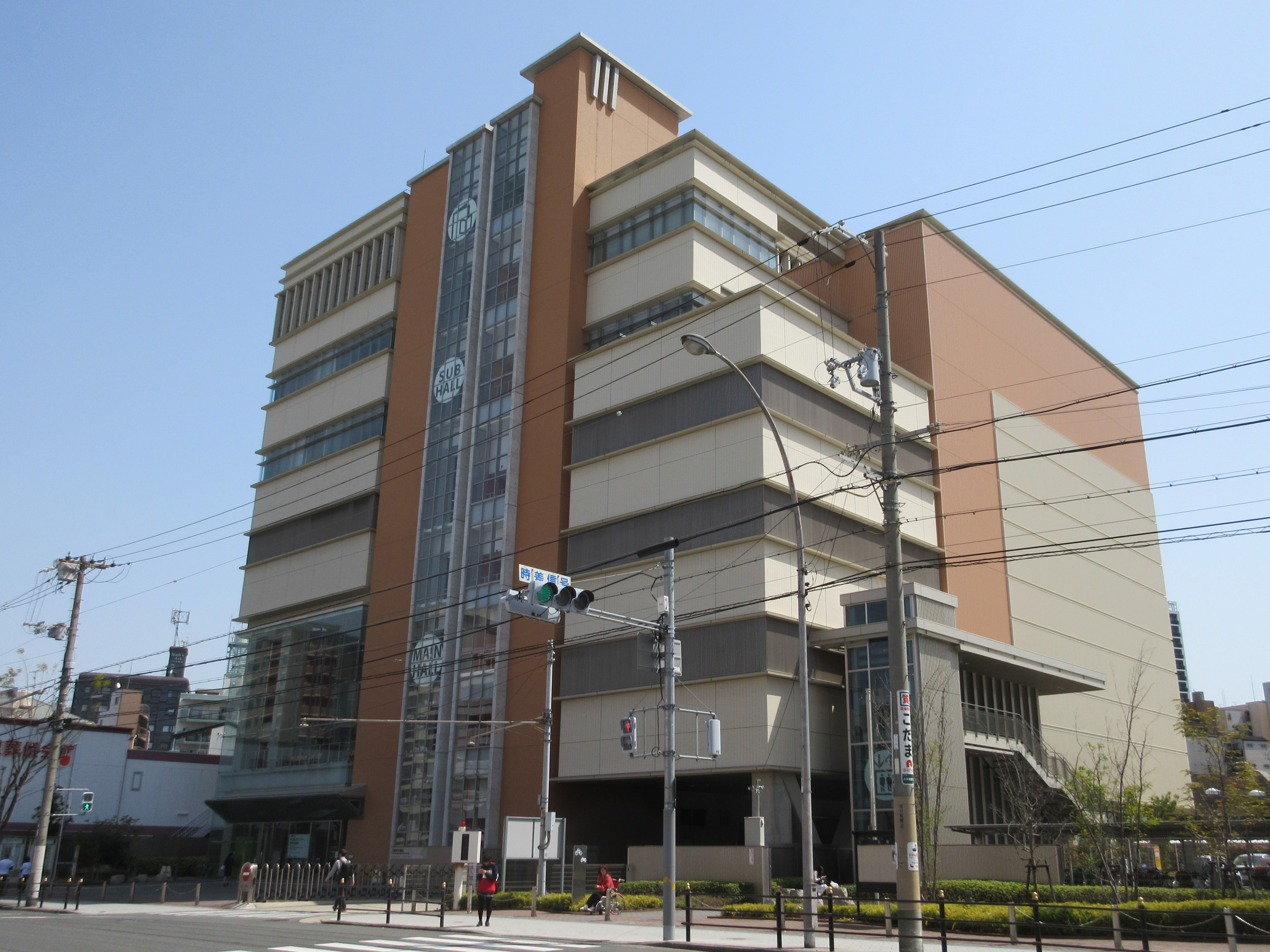 東成区民センター